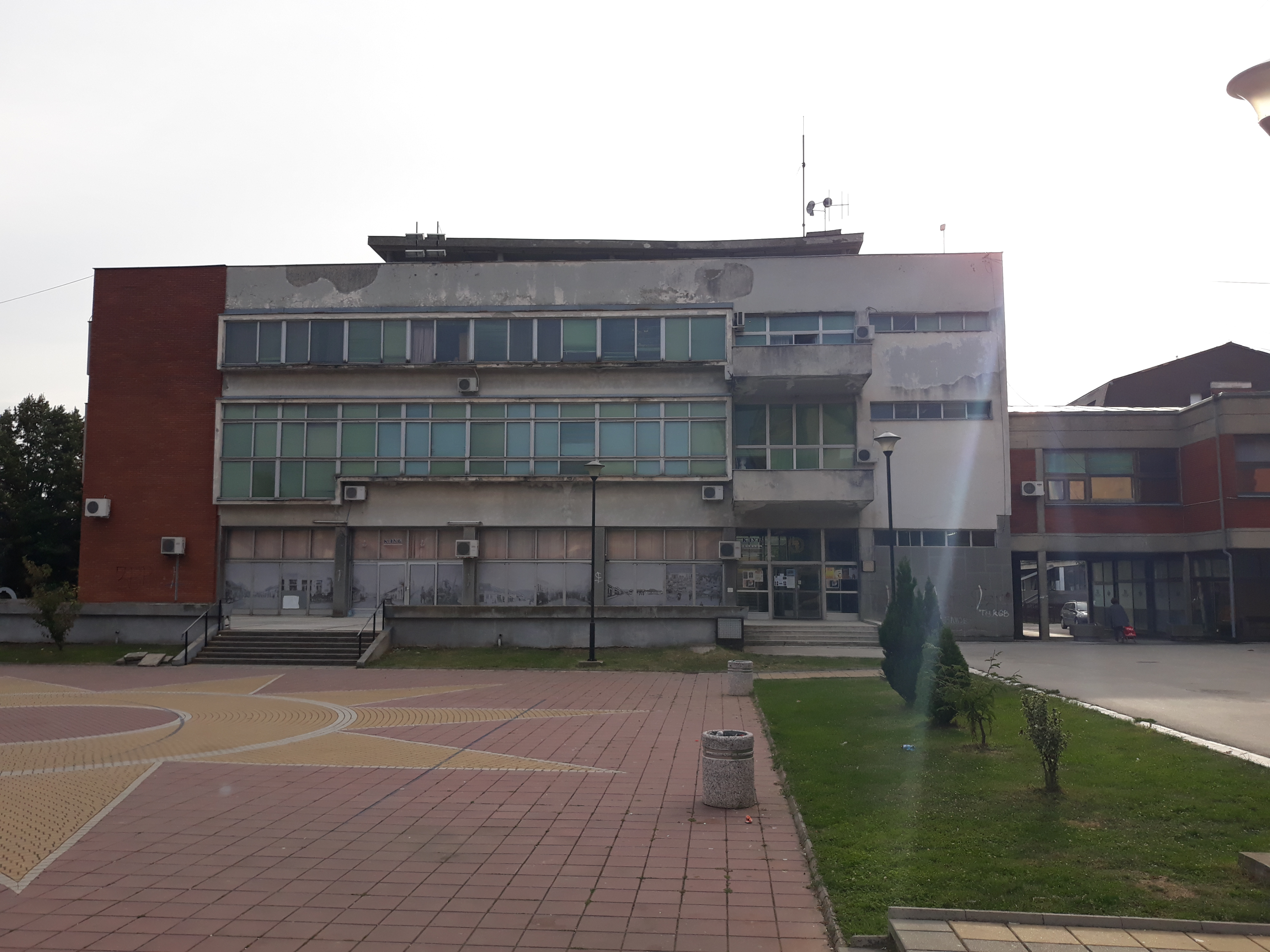 Народни универзитет у Трстенику